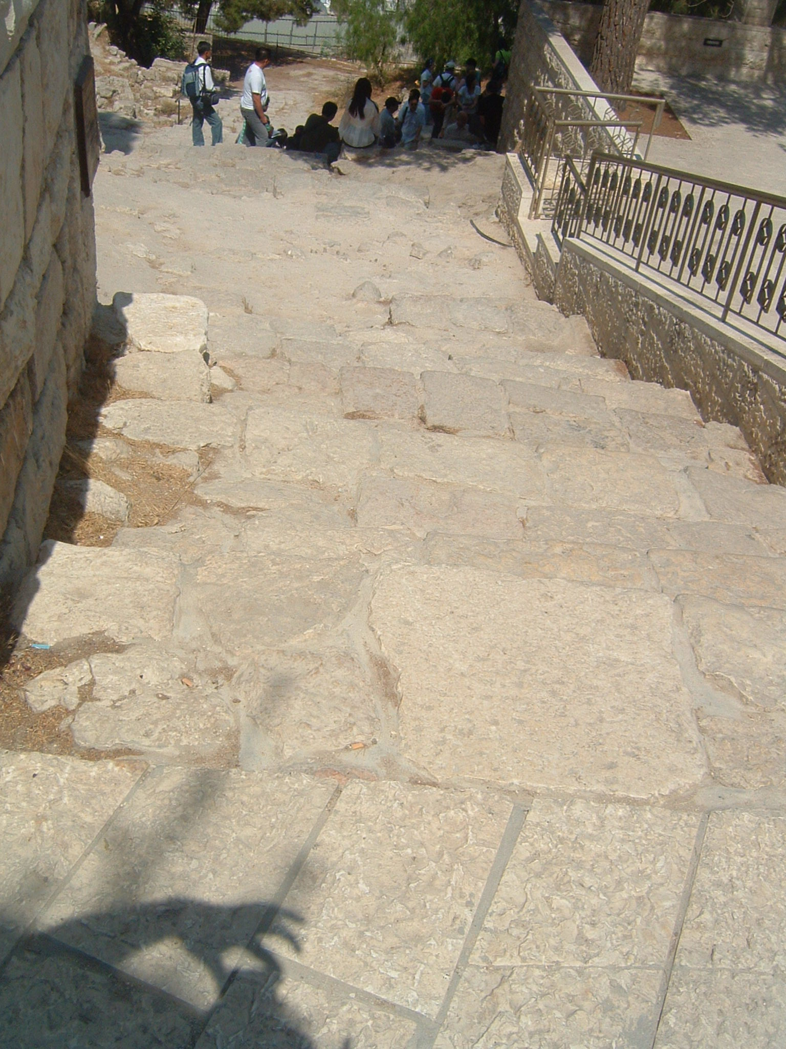 Scalinata romana a Gerusalemme. Foto scattata da me l'11 giugno 2008